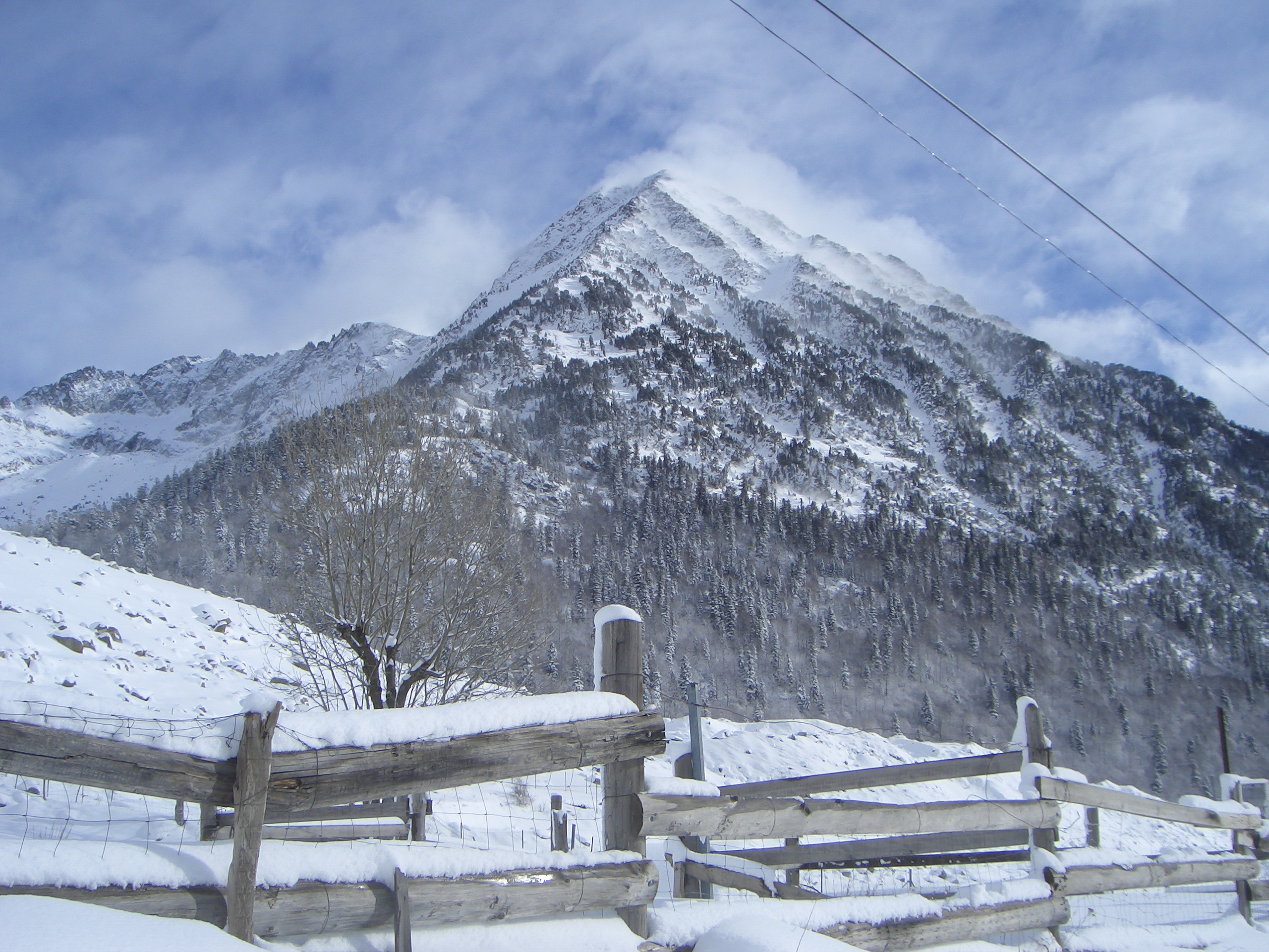 Tuc de Contesa